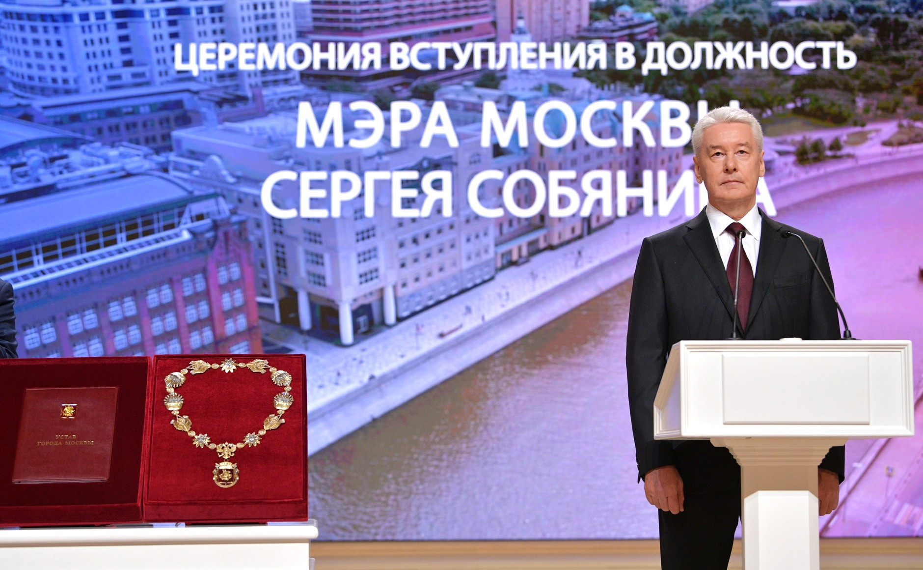 Церемония инаугурации Мэра Москвы Сергея Собянина